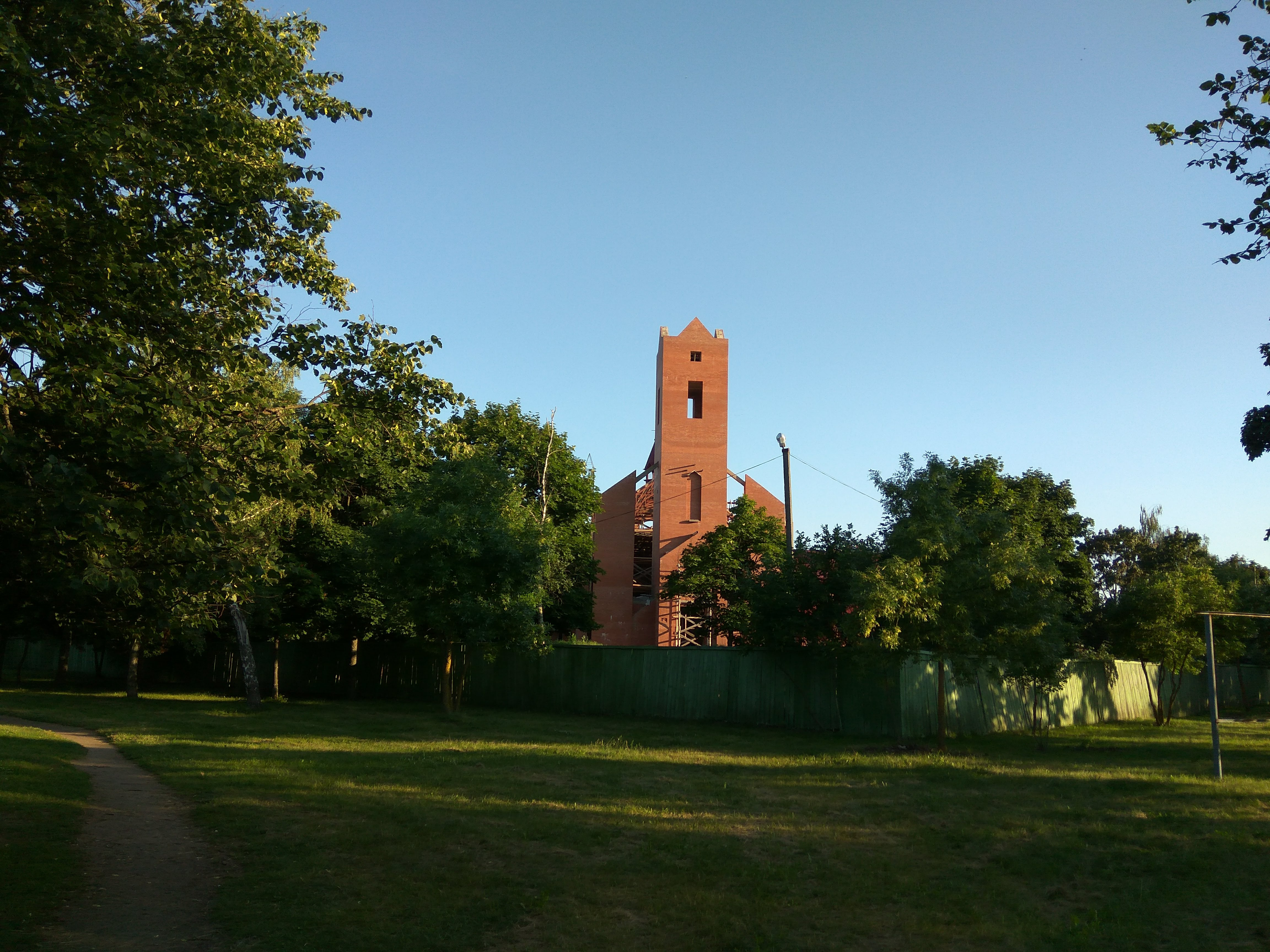 Магілёў. Парк імя 60-годдзя Вялікага Кастрычніка